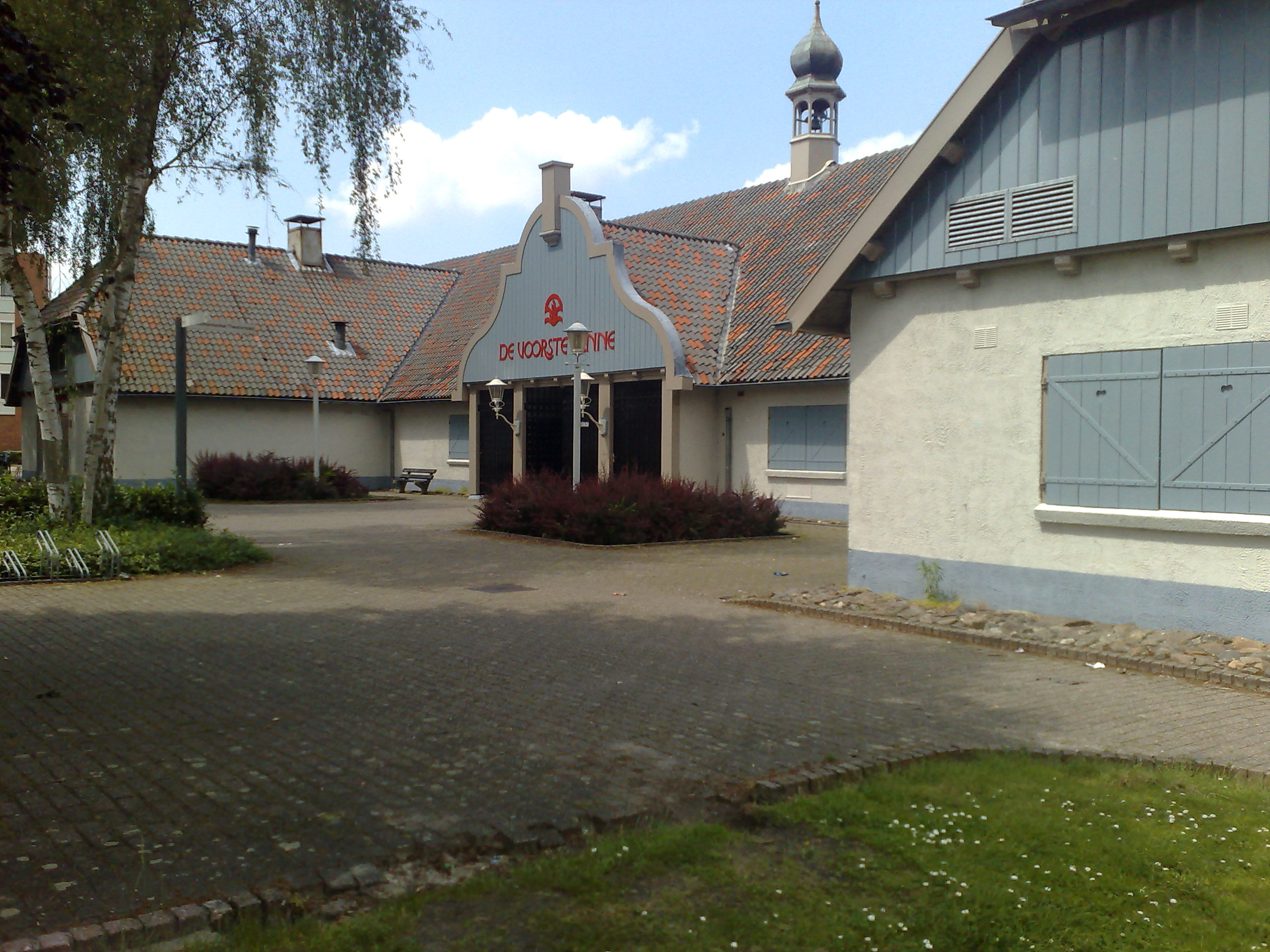 Drunen, Voorste Venne, ontworpen door Anton Pieck